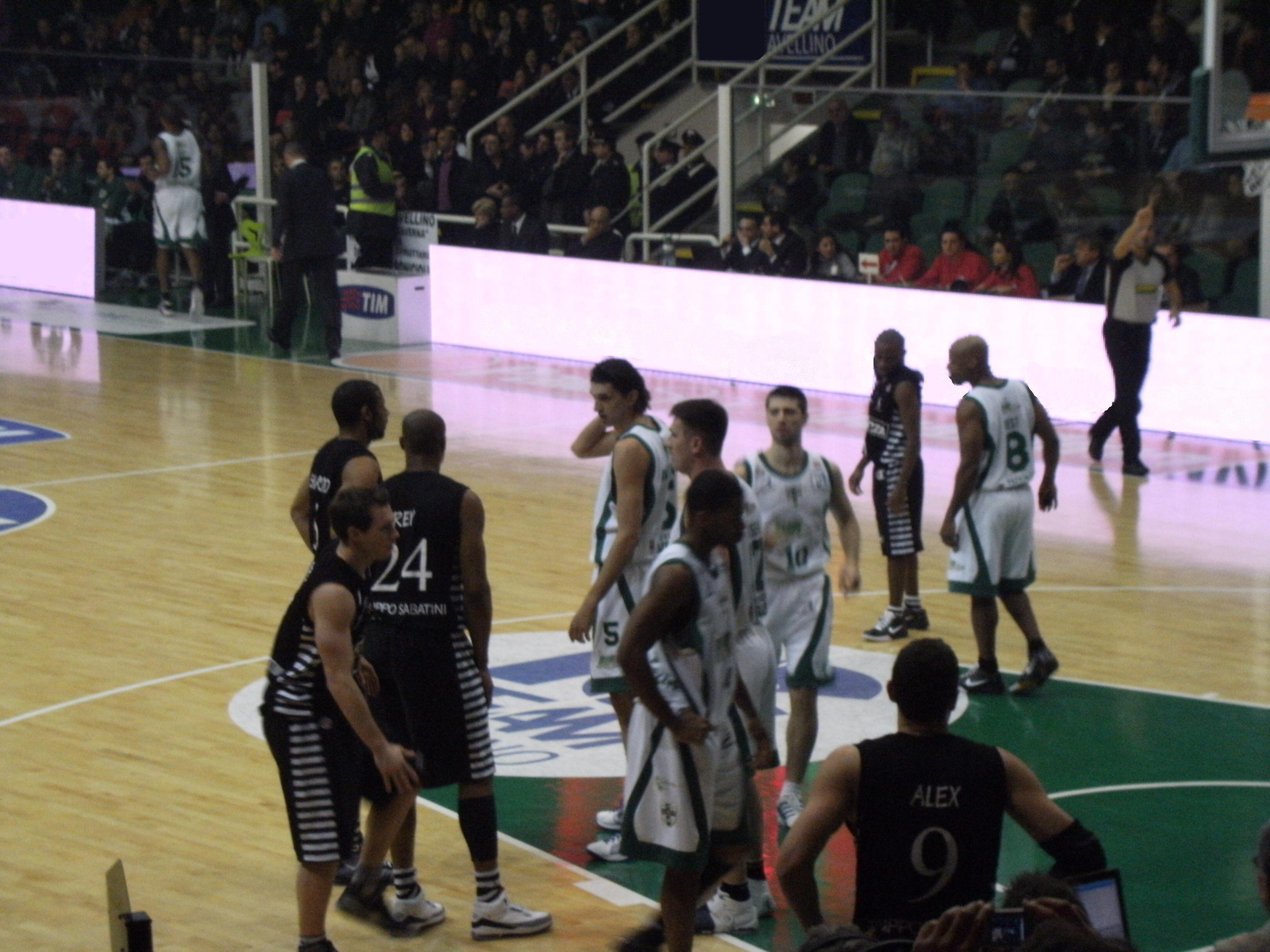 Serie A FIP 2008-09 Felice Scandone Avellino-Virtus Bologna